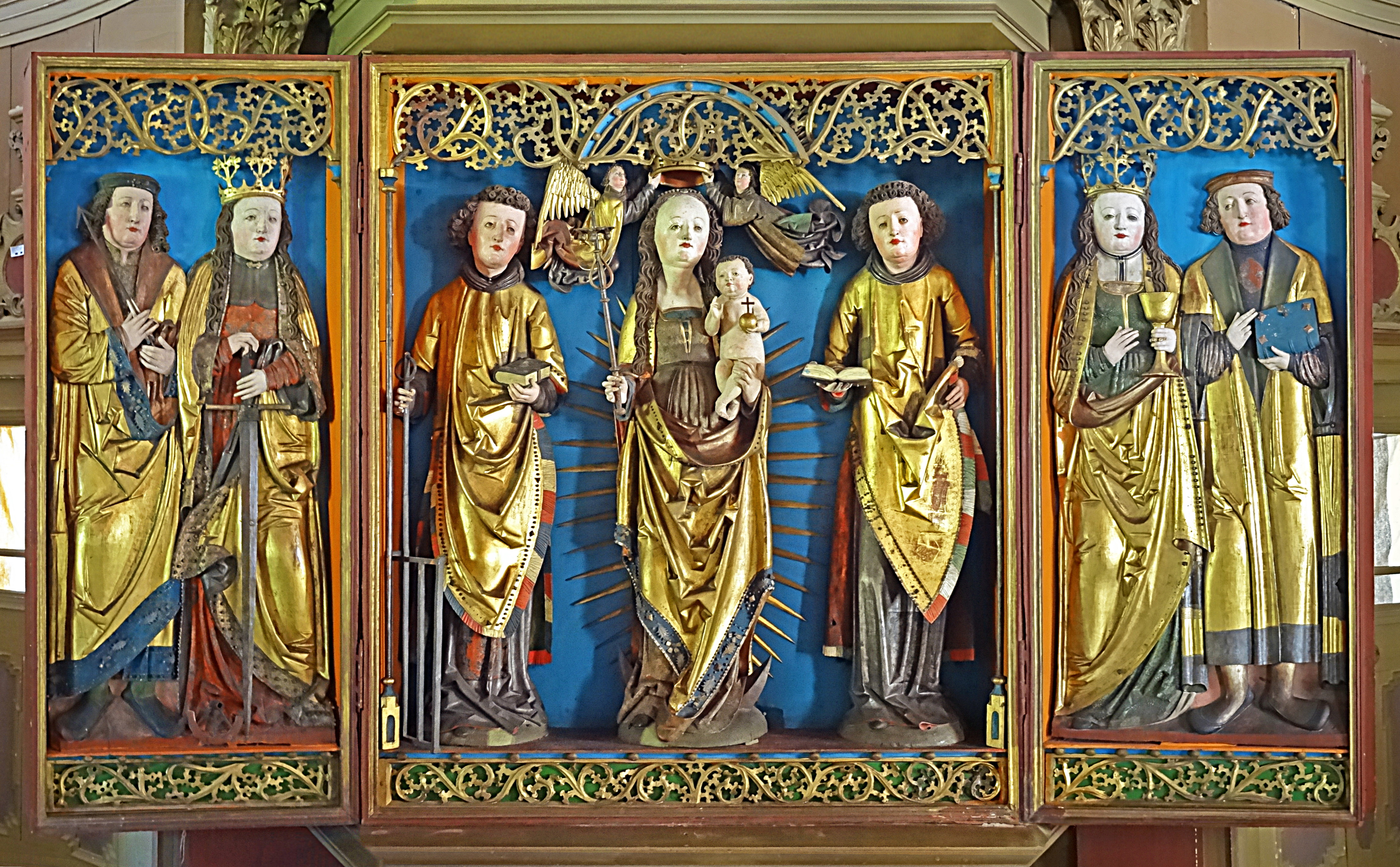 Flügelaltar von 1525 in der Dorfkirche St. Laurentius (Gräfenroda). Die Festtagsseite zeigt im Schrein Maria mit Kind und zwei Kronenengeln, flankiert von den Heiligen Laurentius und Stephanus, weitere Heilige in den Flügeln.